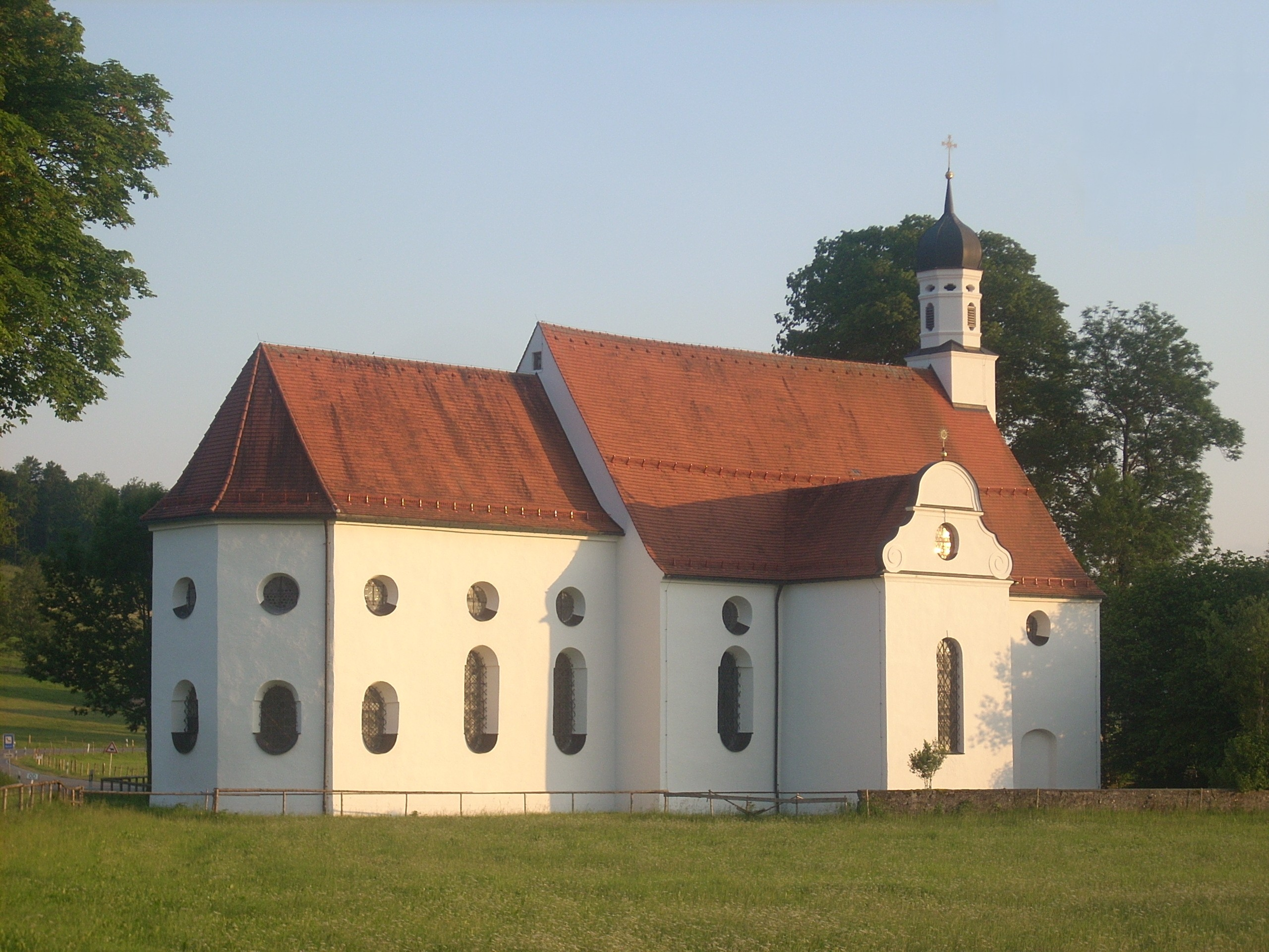 Steingaden-Ilgen, Wallfahrtskirche von Norden